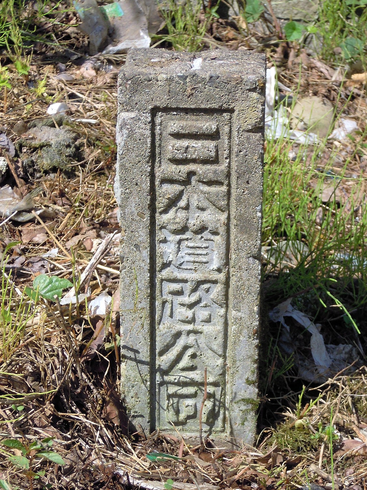 岩手県陸前高田市に残る通岡道路時代の境界杭。日本道路公団の文字が見える。